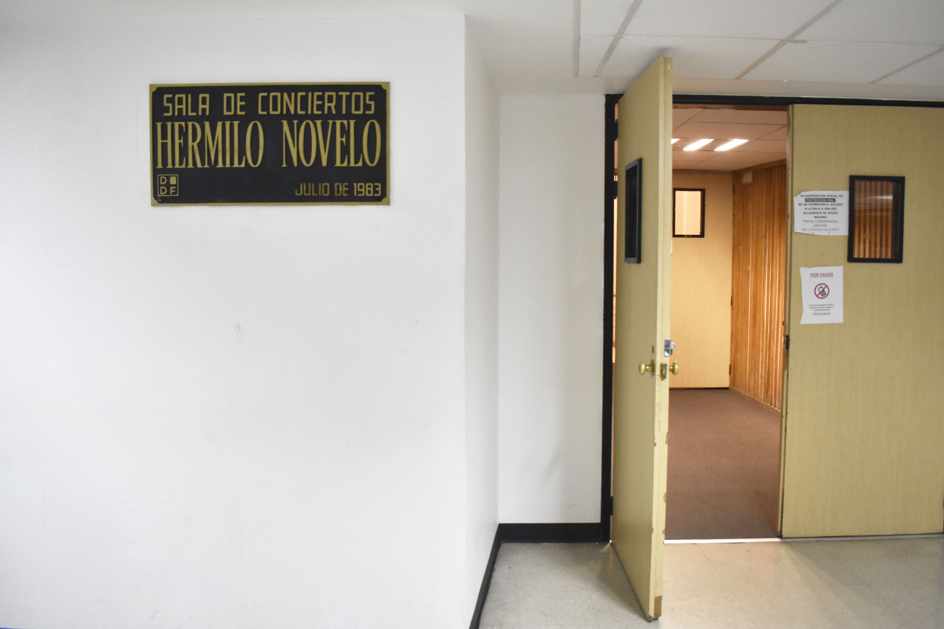 Martes 9 de julio de 2019. En la Sala Hermilo Novelo del Centro Cultural Ollin Yoliztli, se presentó el recital-examen para obtener el grado de licenciado en ejecución con especialidad en Fagot de Mariano Ryohei Ruelas Takayasu. Fotografía: Tiaré García / Secretaría de Cultura de la Ciudad de México.